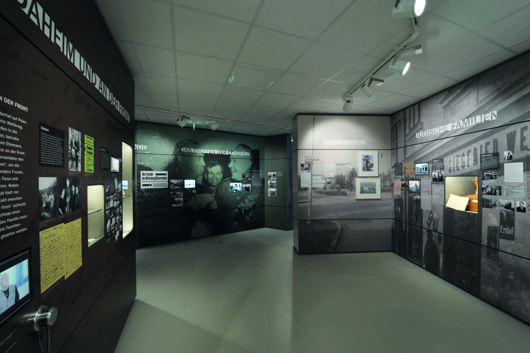 Friedensmuseum Erlauf: Eröffnungsausstellung "Erlauf erinnert" (2015)